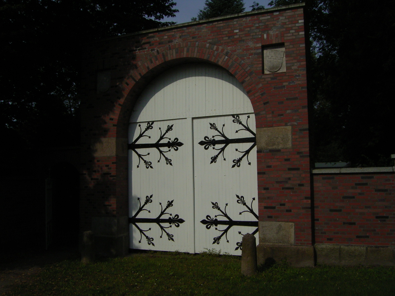 Rittergut Wiegersen